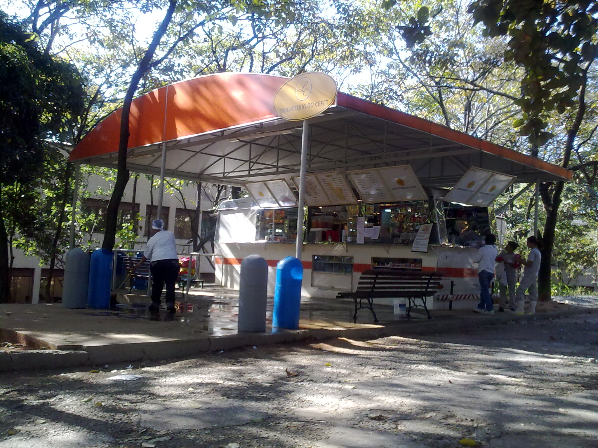 Cantina no campus II do Cefet-MG, em Belo Horizonte, Brasil.